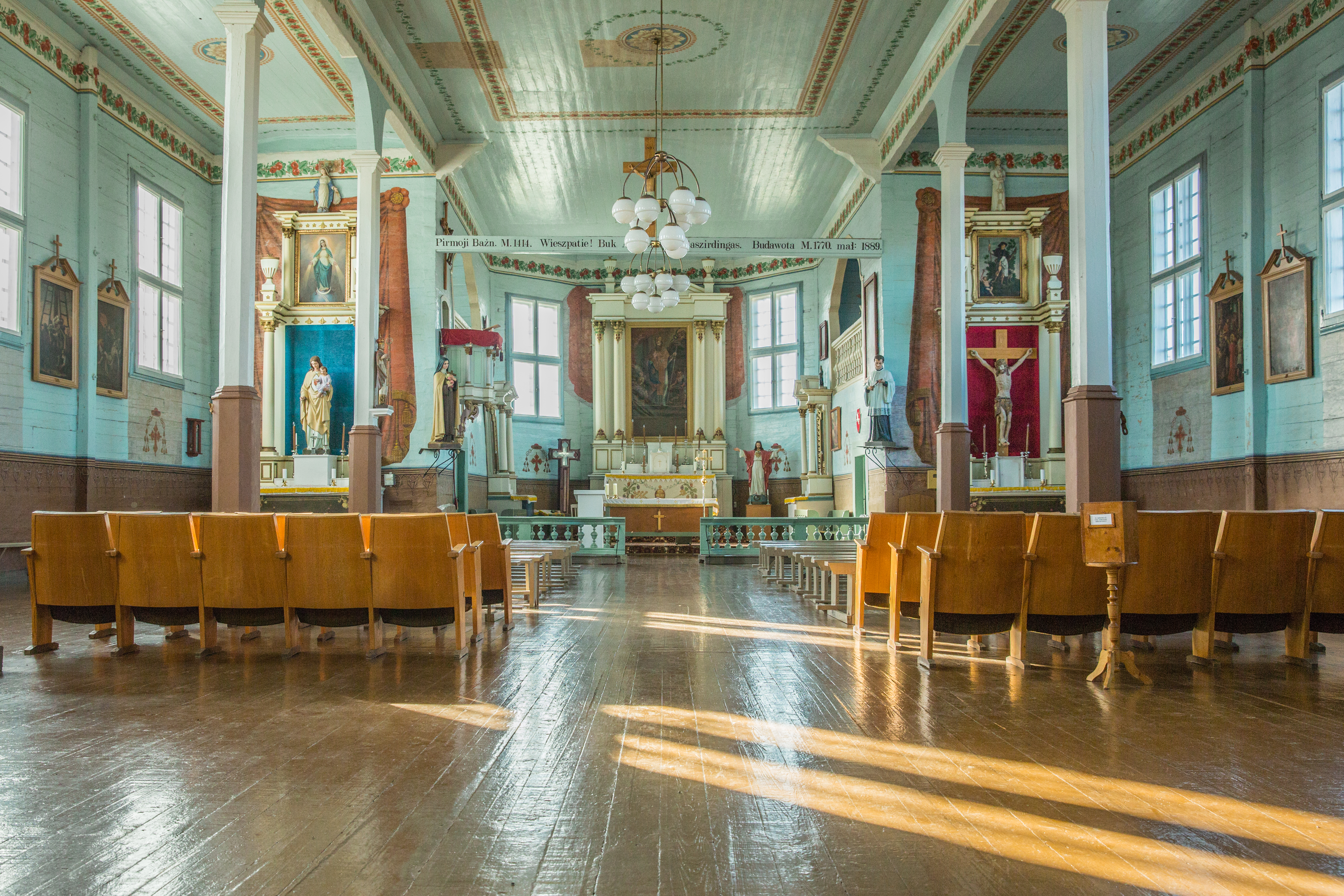 Šv. Aleksandro bažnyčios vidus 2